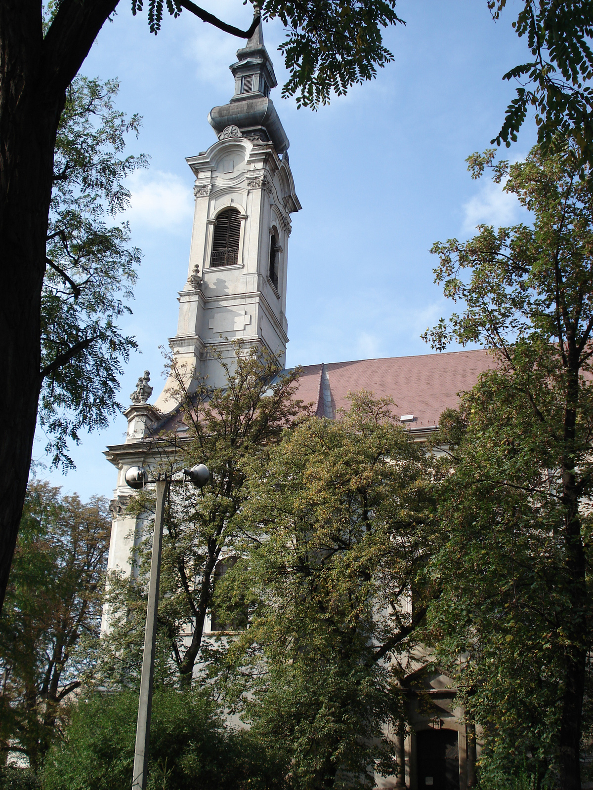 Gör. kel. templom (Miskolc, Deák Ferenc-tér 7.)